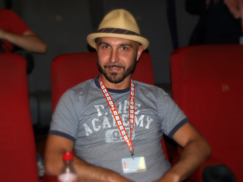 RFF - Maccio Capatonda - (Marcello Macchia)